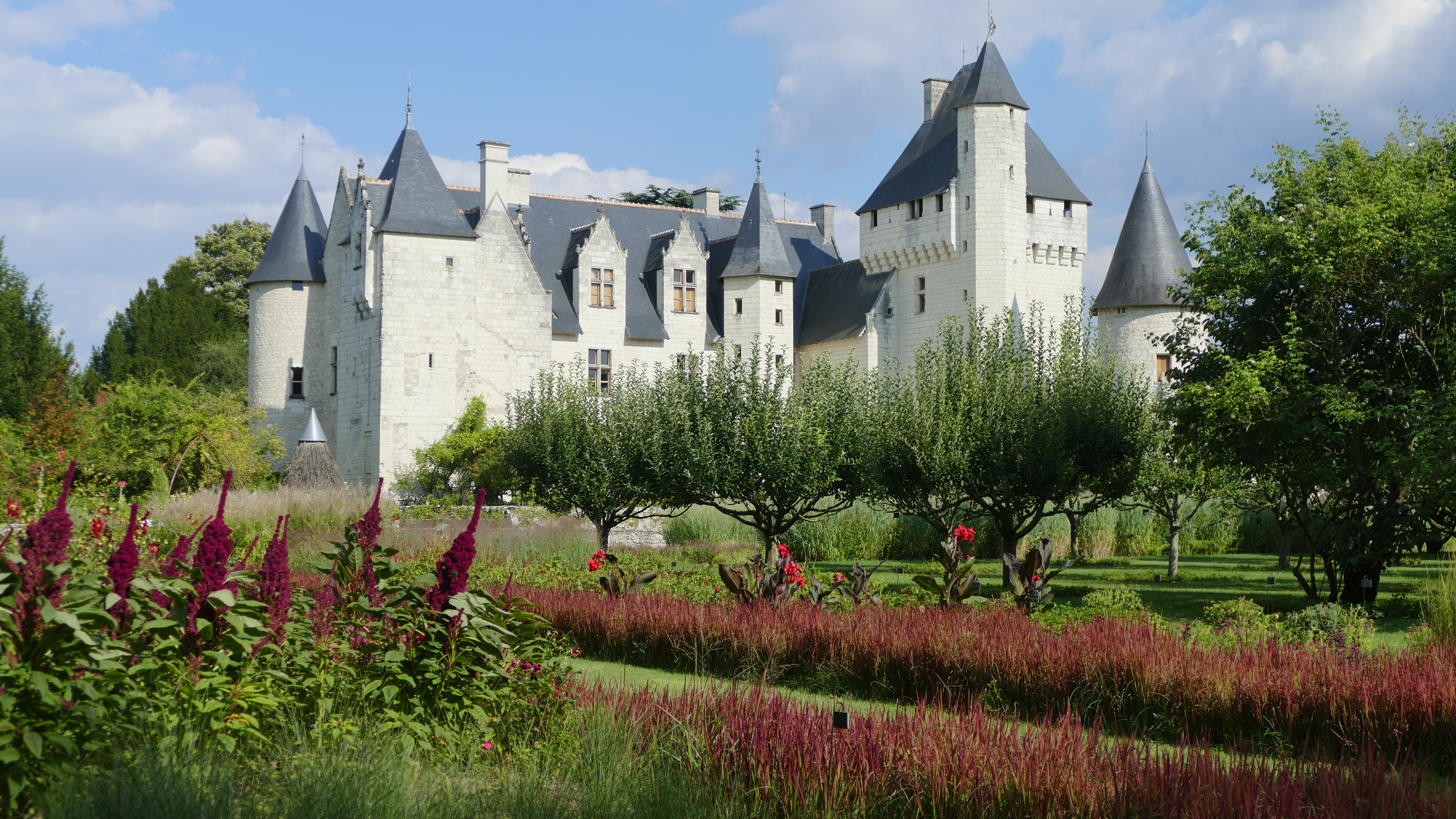 Château du Rivau .